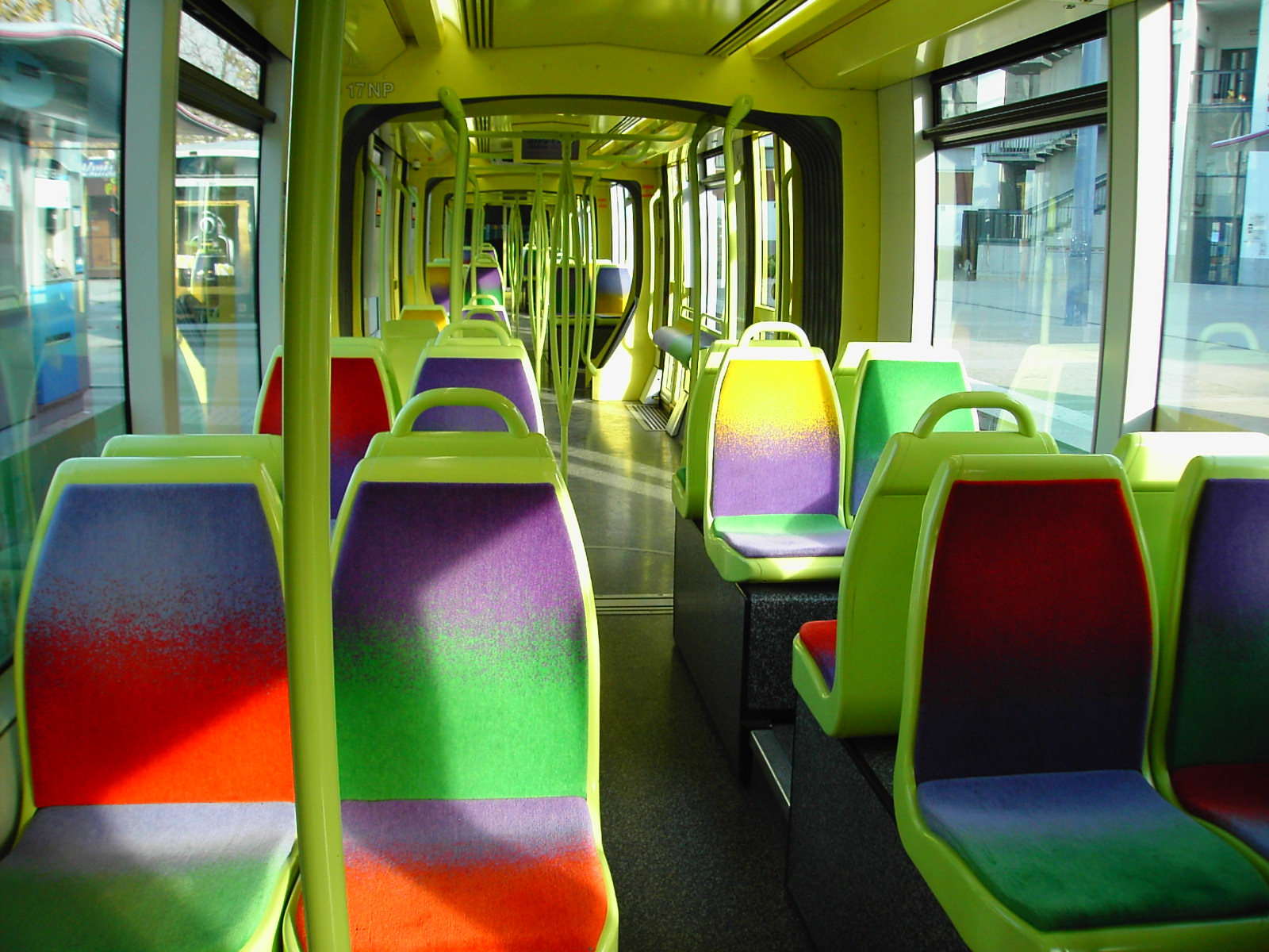 Intérieur Tramway Citadis - Grenoble